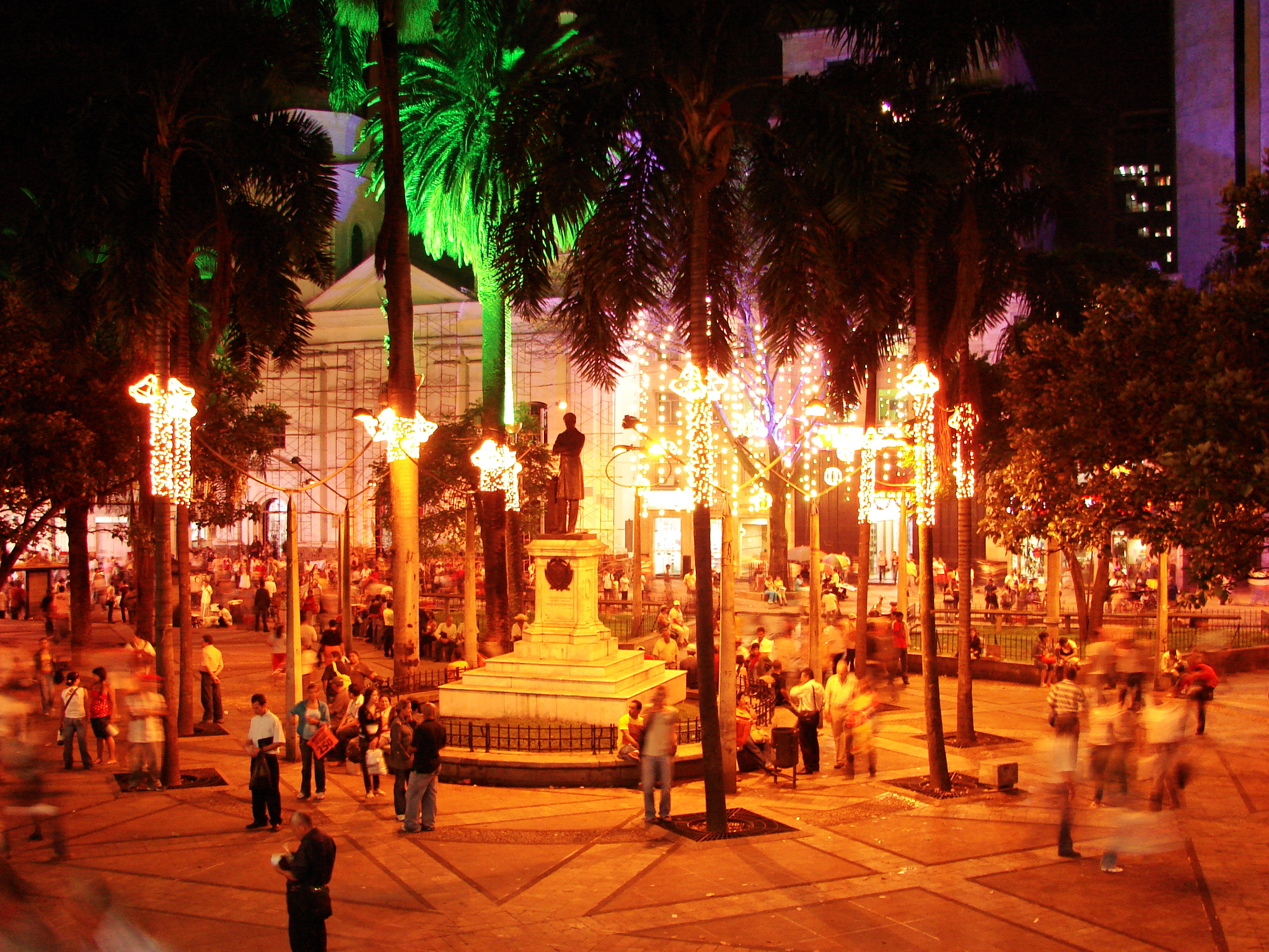 Alumbrados en el Parque Berrío 2007. Medellín, Colombia